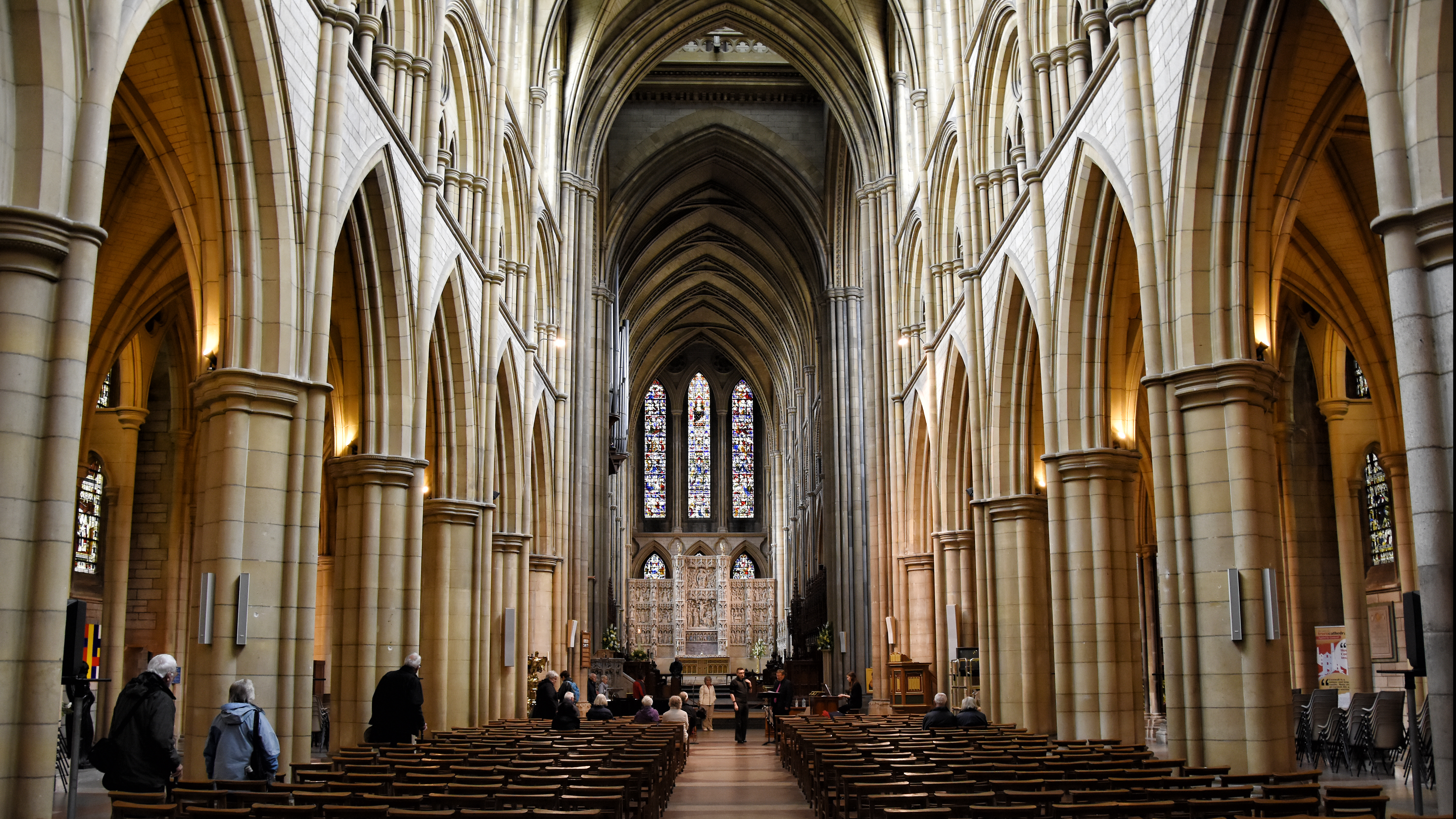 Kathedraal van Truro, UK